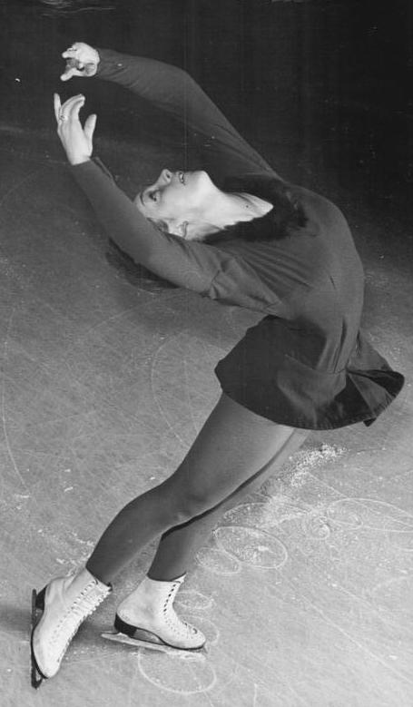 Heidi Steiner Zentralbild Kohls 8.12.1963 Olympia-Ausscheidungen im Eiskunstlauf stehen bevor. Um die noch zu vergebenden Plätze für die gemeinsame deutsche Olympiamannschaft geht es bei den Olympia-Ausscheidungen zwischen den Eiskunstläufern der DDR und Westdeutschland, die am 12.12.1963 in der Berliner Werner-Seelenbinder-Halle und am 19.12.1963 in Westberlin stattfinden. UBz: Heidi Steiner (SC Dynamo Berlin) zeigt eine Himmelspirouette.